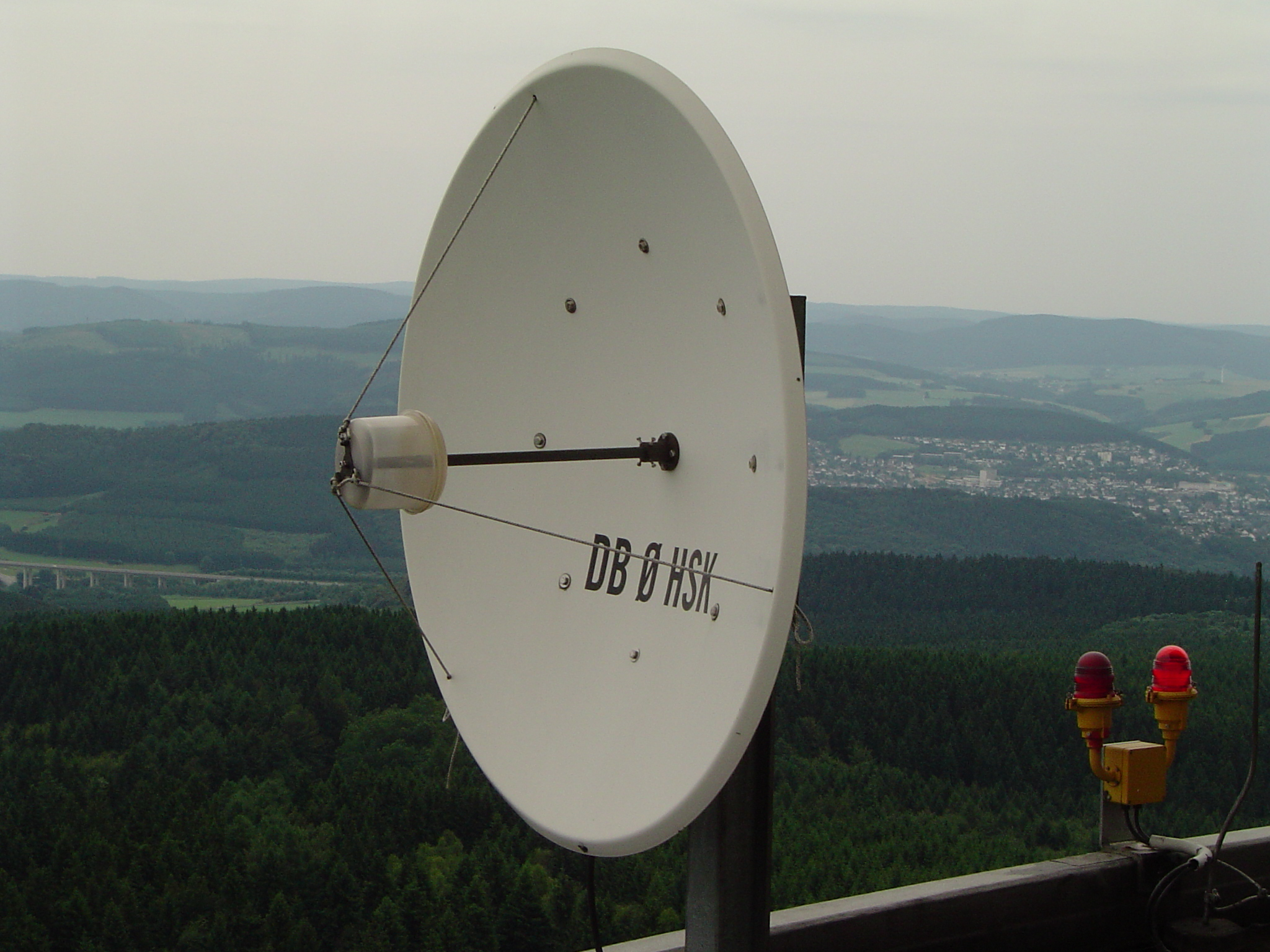 Antenne der deutschen Amateurfunk-Relaisfunkstelle DB0HSK